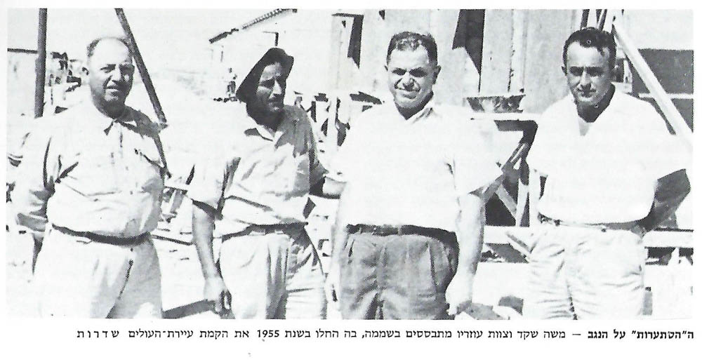 הקבלן משה שקד עם פועלים בבניית שדרות בשנת 1955